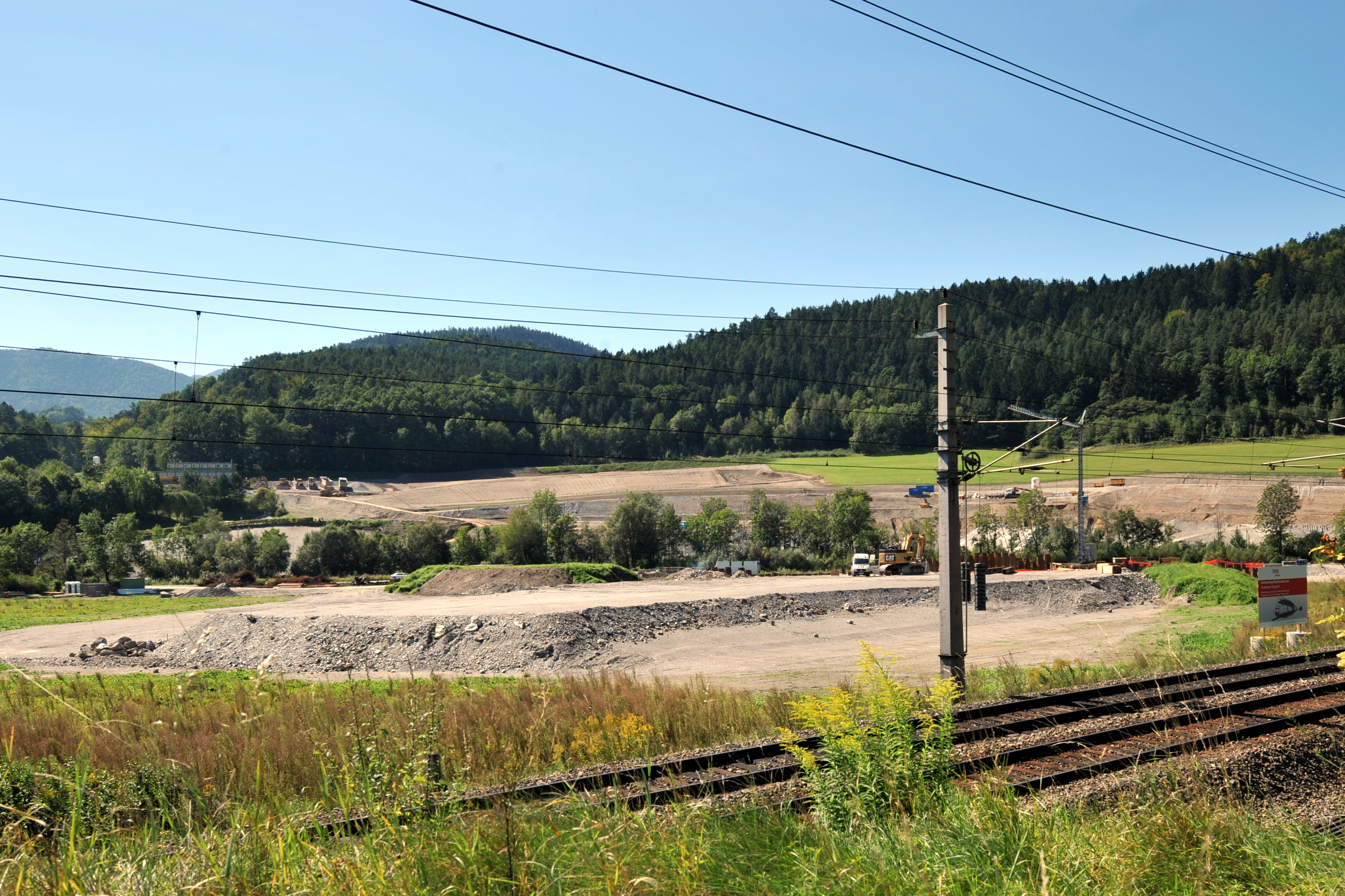 Semmering-Basistunnel Baustelle Gloggnitz am 7.9.2012